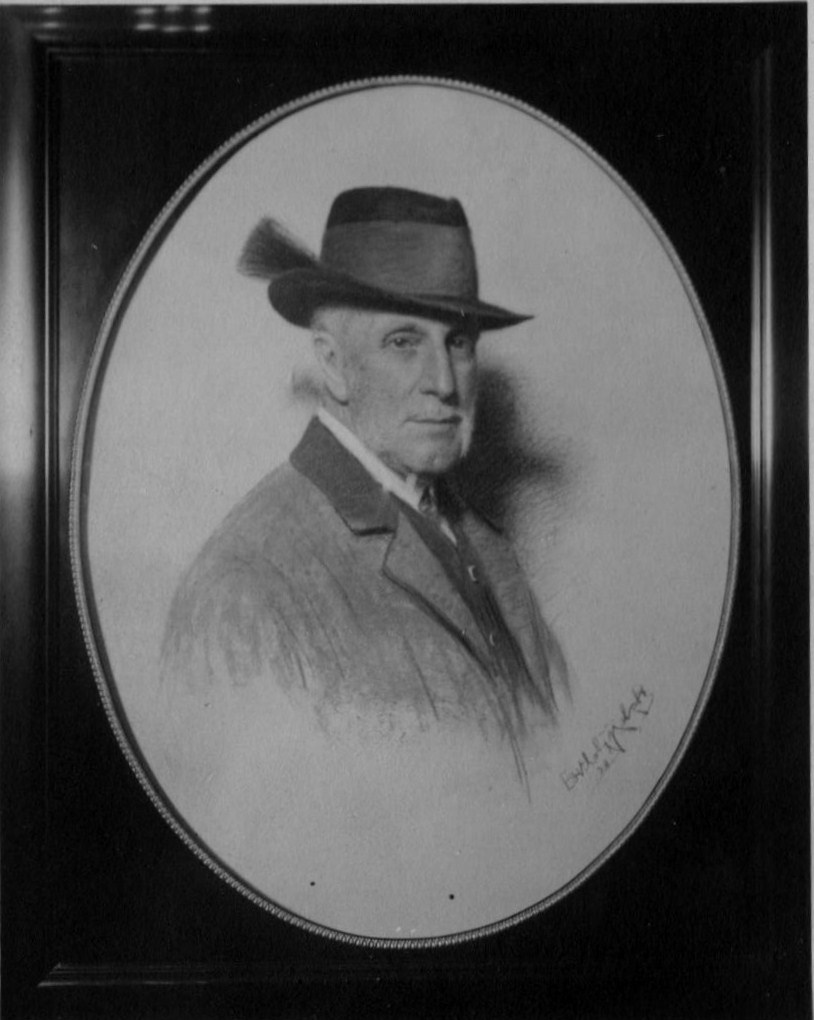 Maximilian Graf von Attems-Gilleis, Freiherr von Heiligenkreuz, K.u.K. Kämmerer, Mitglied d. Herrenhauses d. öst. Reichsrates, Sohn des Anton August Gf. v. Attems-Gilleis, 1834-1891, und der Maria, 1836-1906, geb. Gfin. zu Hardegg auf Glatz u. im Machlande